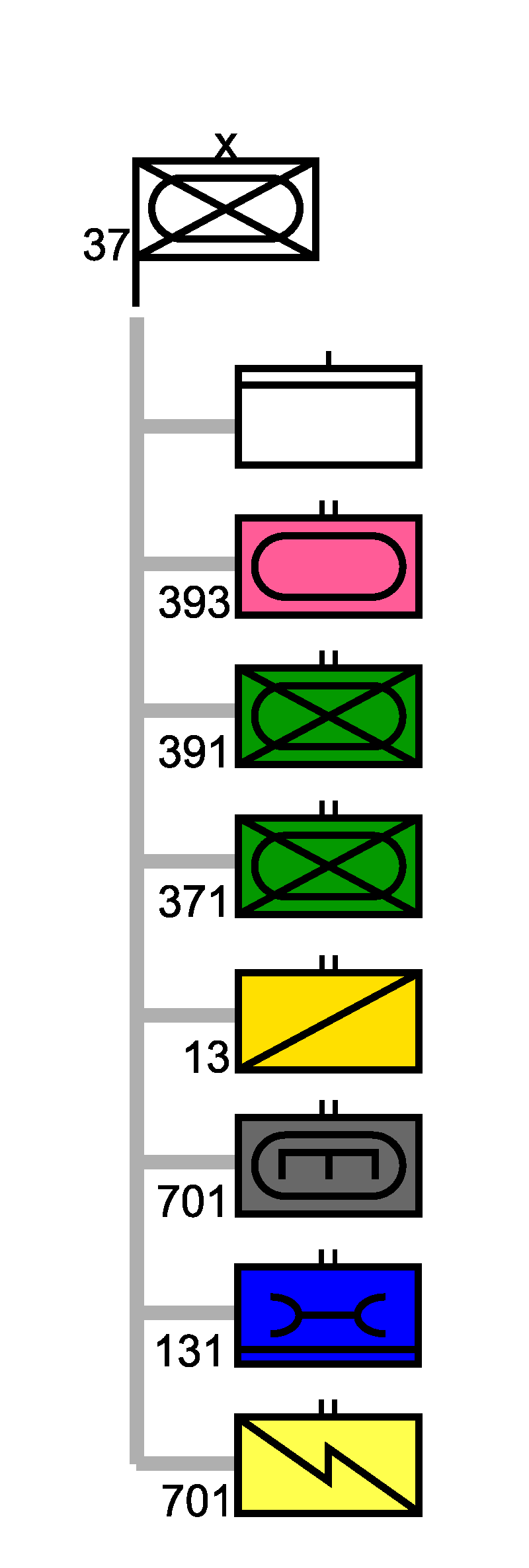 Gliederung Panzergrenadierbrigade 37 im deutschen Heeres.